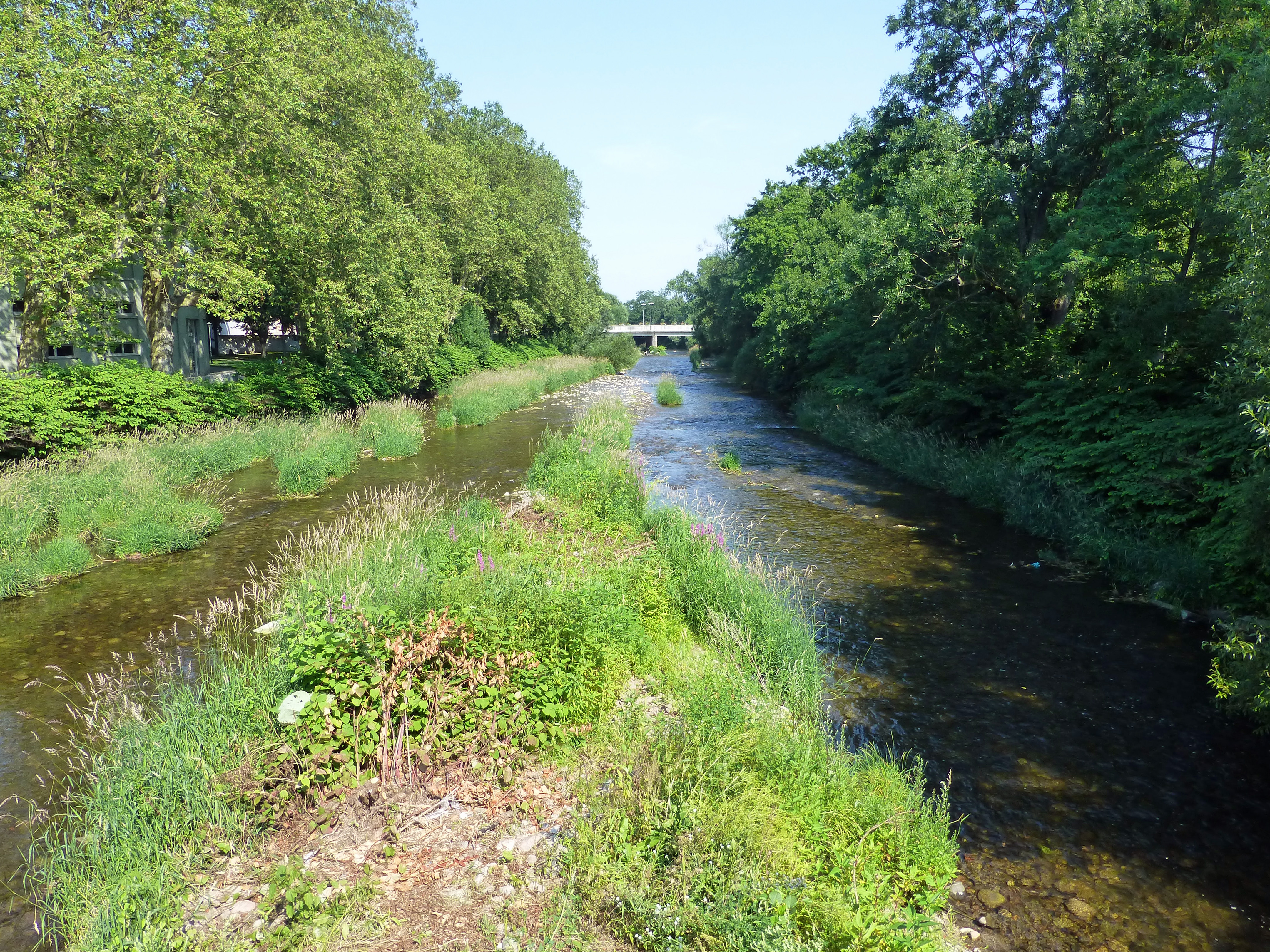 La Thur à Cernay (Haut-Rhin)